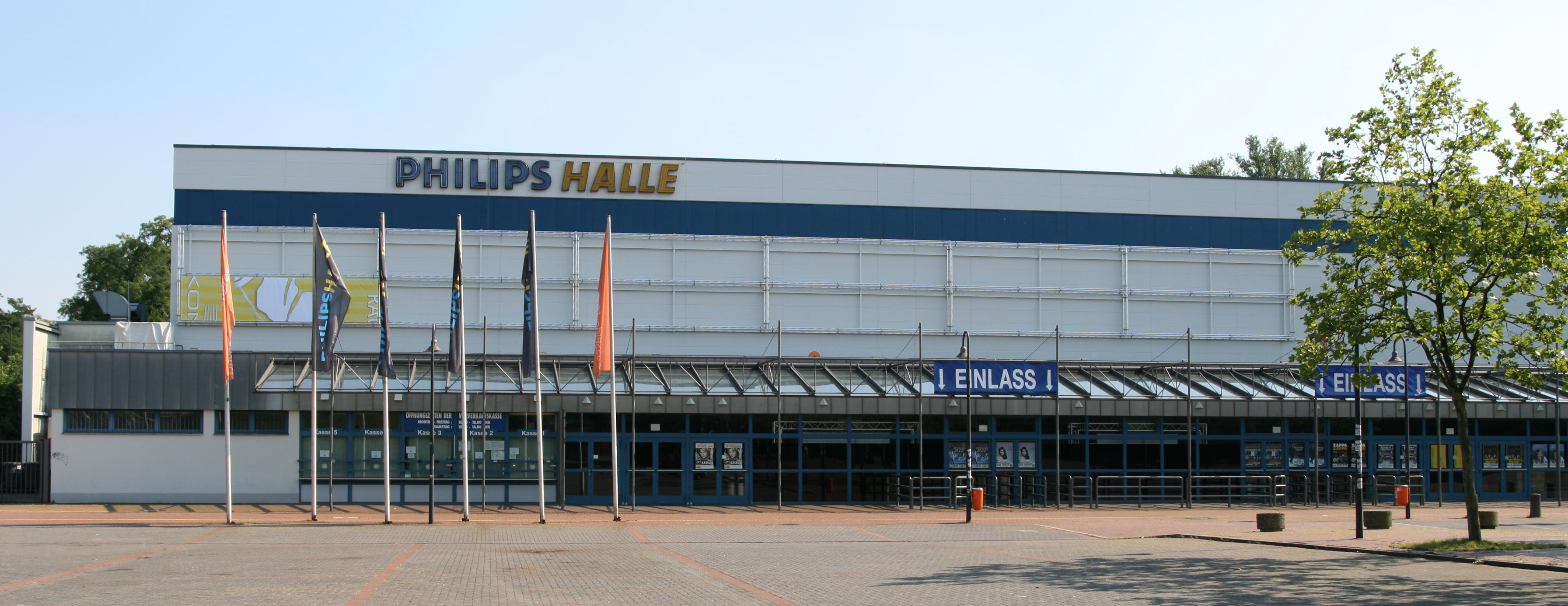 Philipshalle in Düsseldorf, Germany